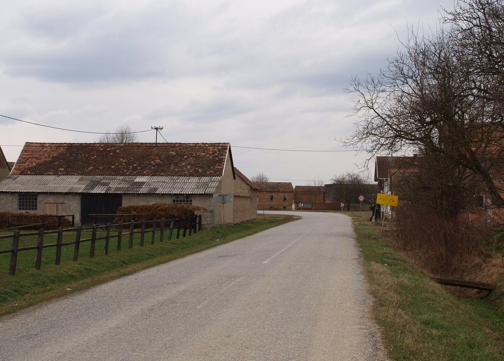 Ulaz u selo Kanižu, Brodsko-posavska županija.